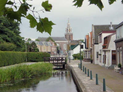 Zoetermeer, dorp. Eigen foto, juli 2004